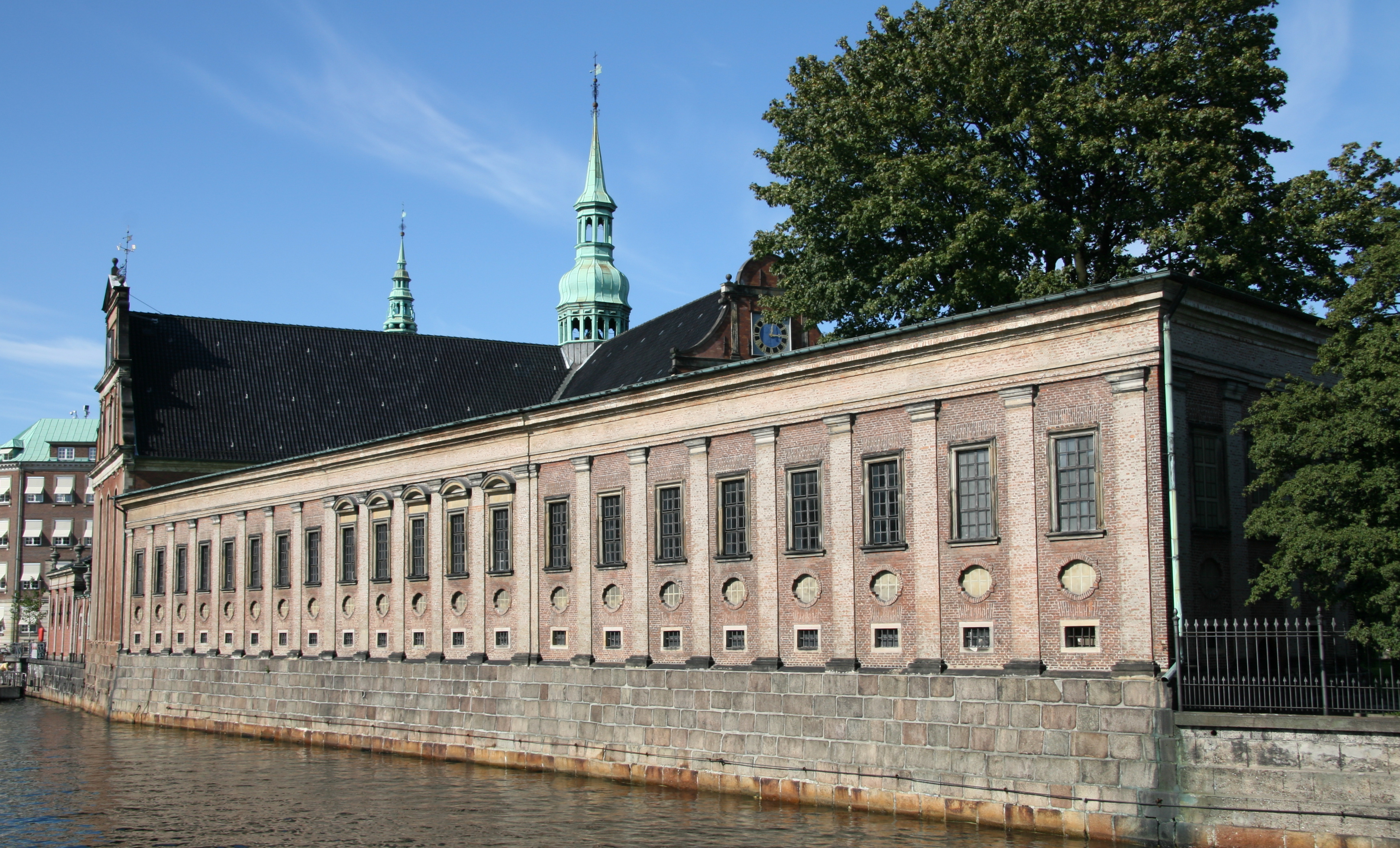 Holmens Kirke, Copenhagen, Denmark . Store kapel vestsiden.